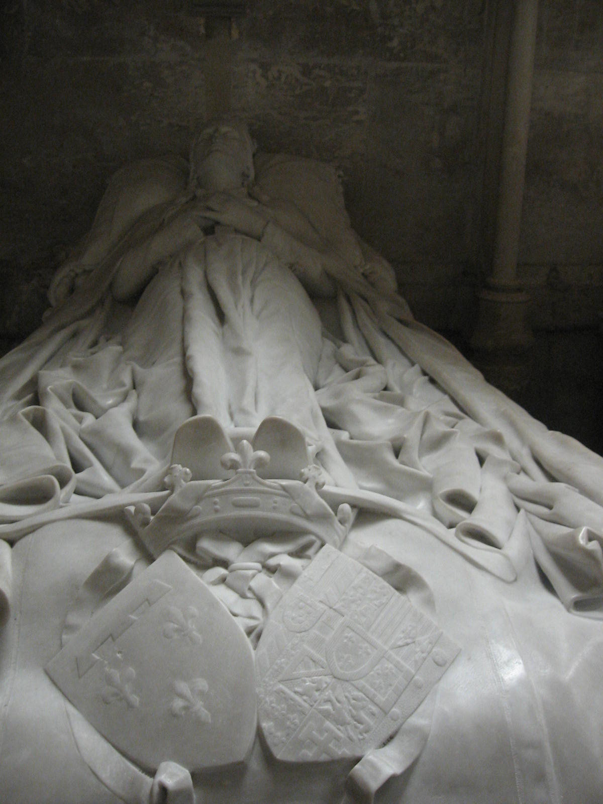 Marie-Caroline de Bourbon, princesse des Deux-Siciles, duchesse d'Aumale, inhumée dans la chapelle Saint-Charles Borromée à Weybridge, transférée en 1876